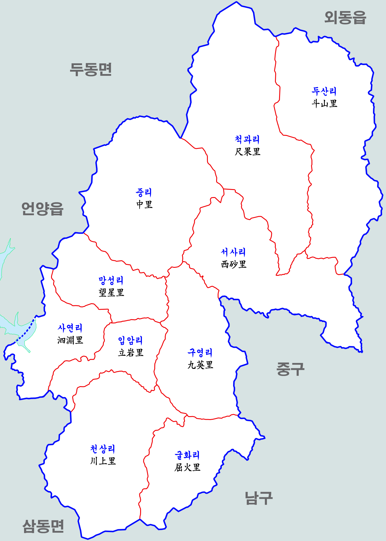 울주군 범서읍 행정구역도